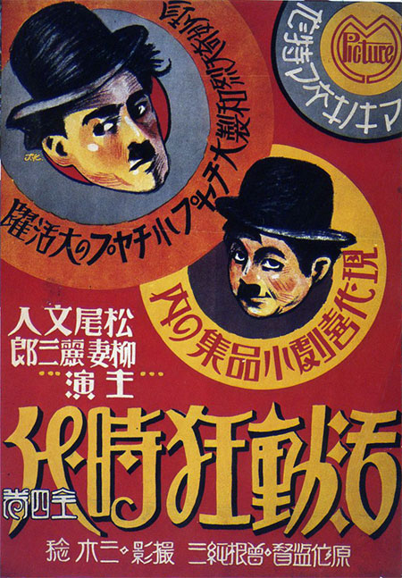 『活動狂時代』、1926年公開時のポスター